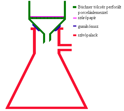 A Büchner-tölcsér és szívópalack használata